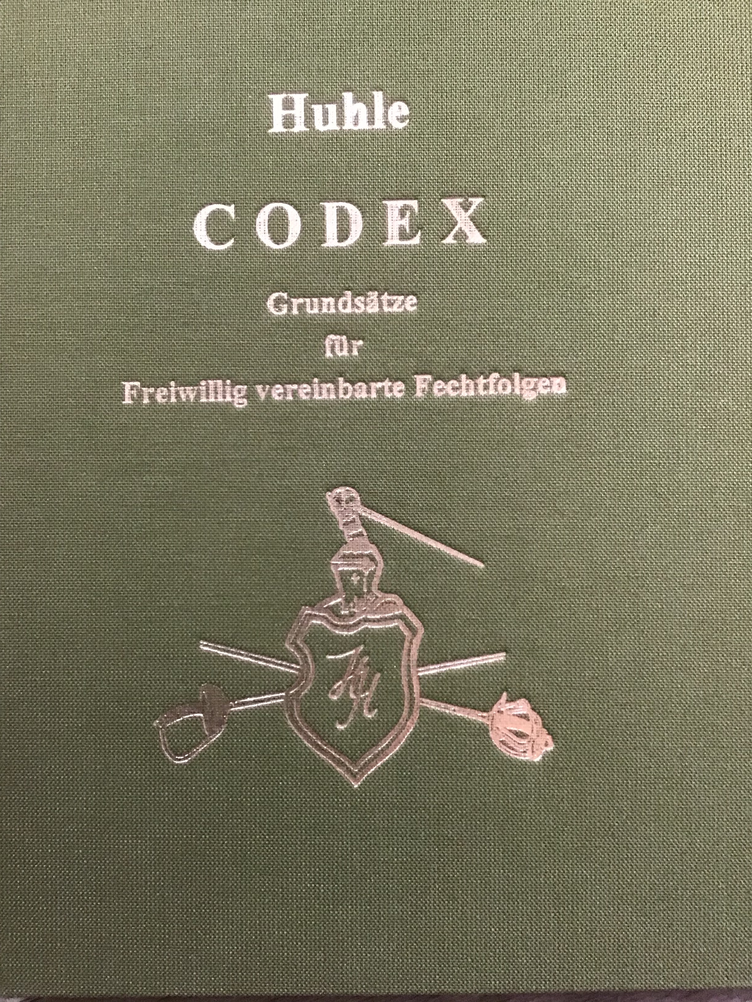 Huhles Codex zur Freiwillig vereinbarten Fechtfolge